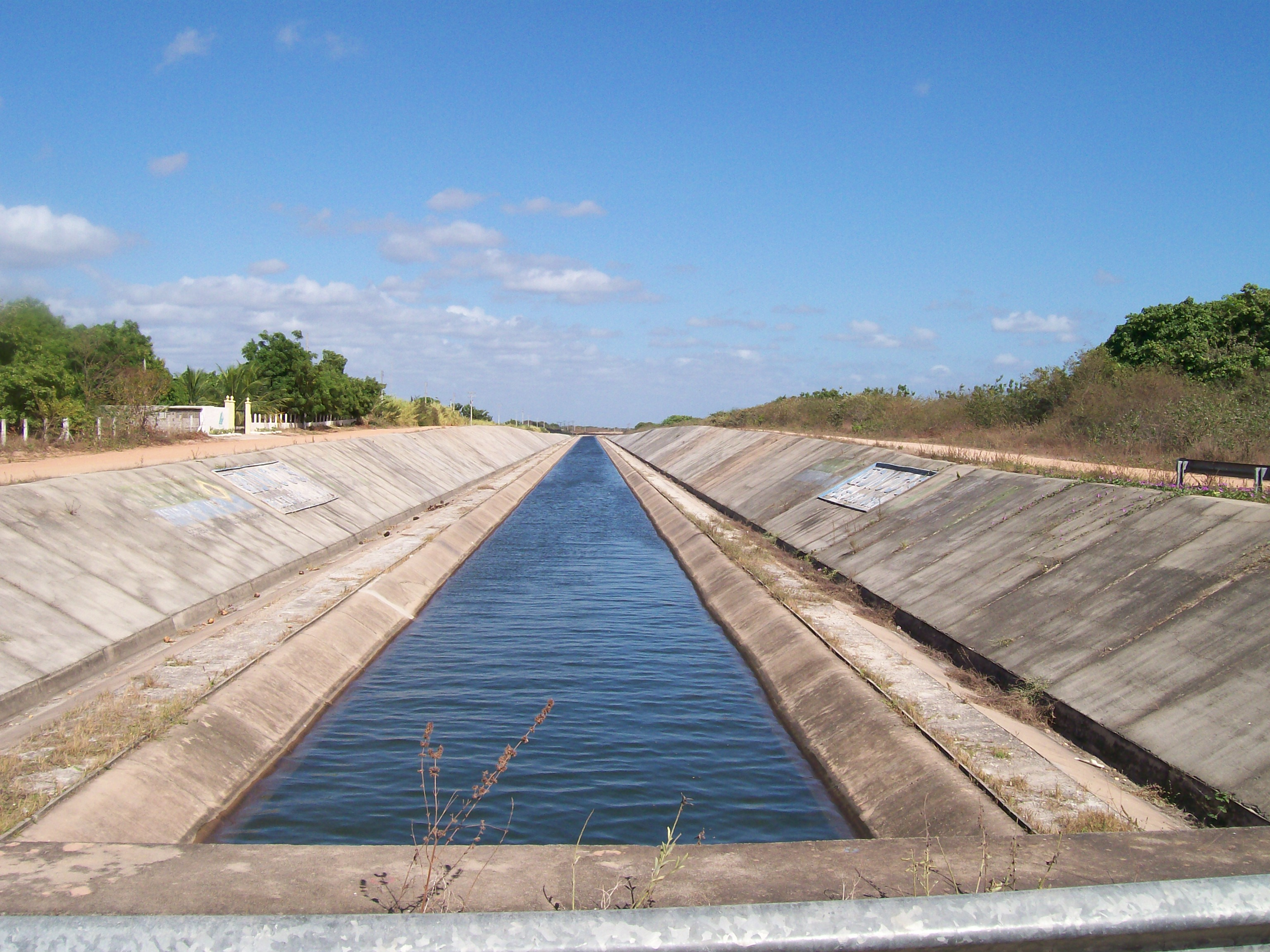 Canal do Baixo Acaraú